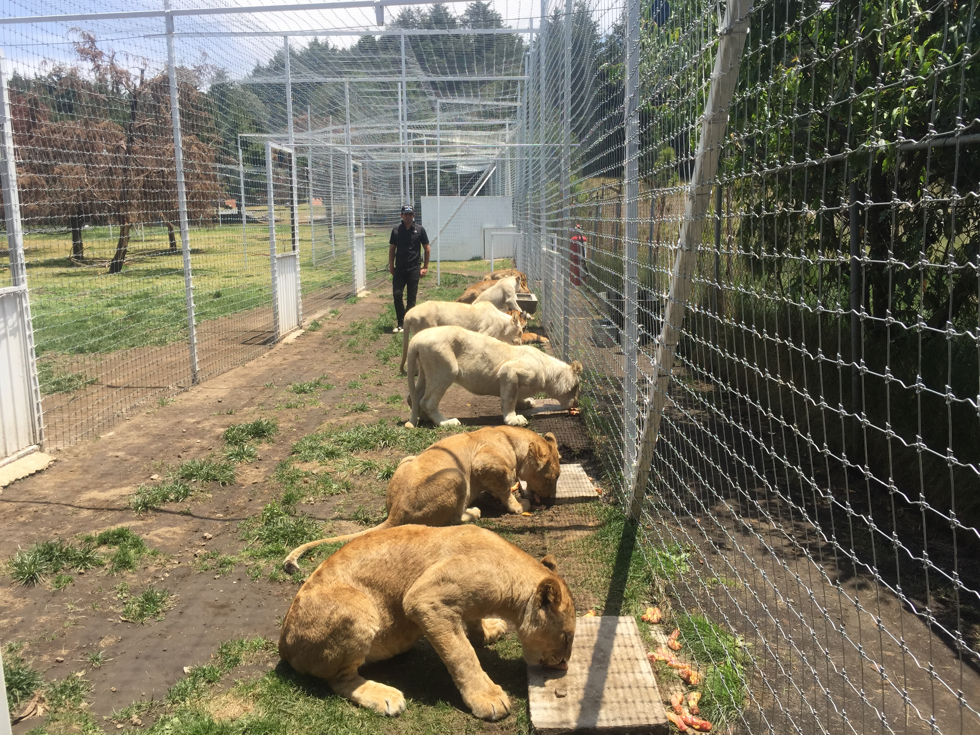 edi